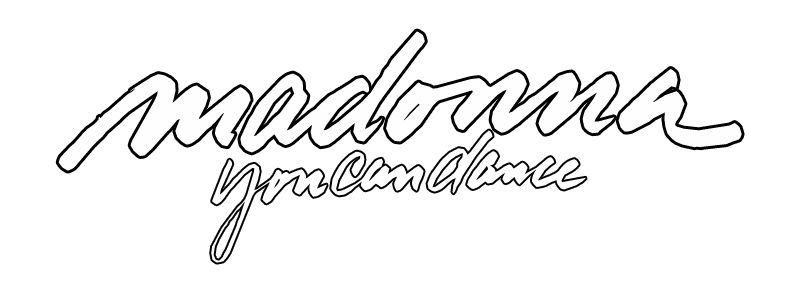 Logotipo del álbum de Madonna 'You Can Dance'.